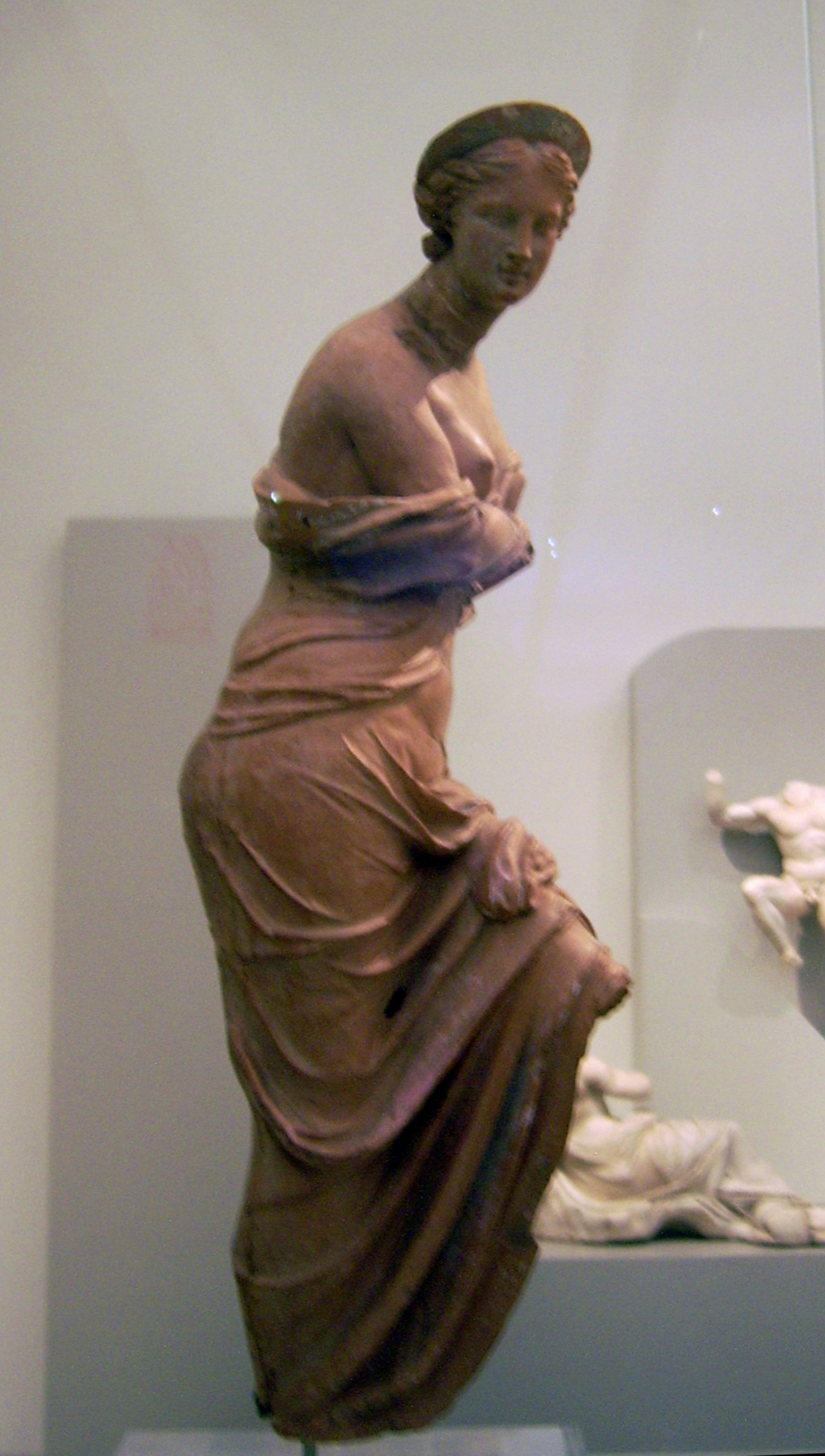 Tonfigur der Aphrodite; 2. Jh. v. Chr., aus Kleinasien, 1930 für die Antikensammlung Berlin aus der Sammlung Heil erworben, Höhe 37,6 cm, wenige Farbspuren, Inventarnummer 31272